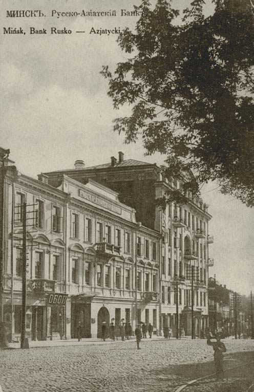 Беларуская (тарашкевіца): Менск (Miensk), Высокі Рынак (Vysoki Rynak). Палац Радзівілаў (Radzivił), перабудаваны пад банк